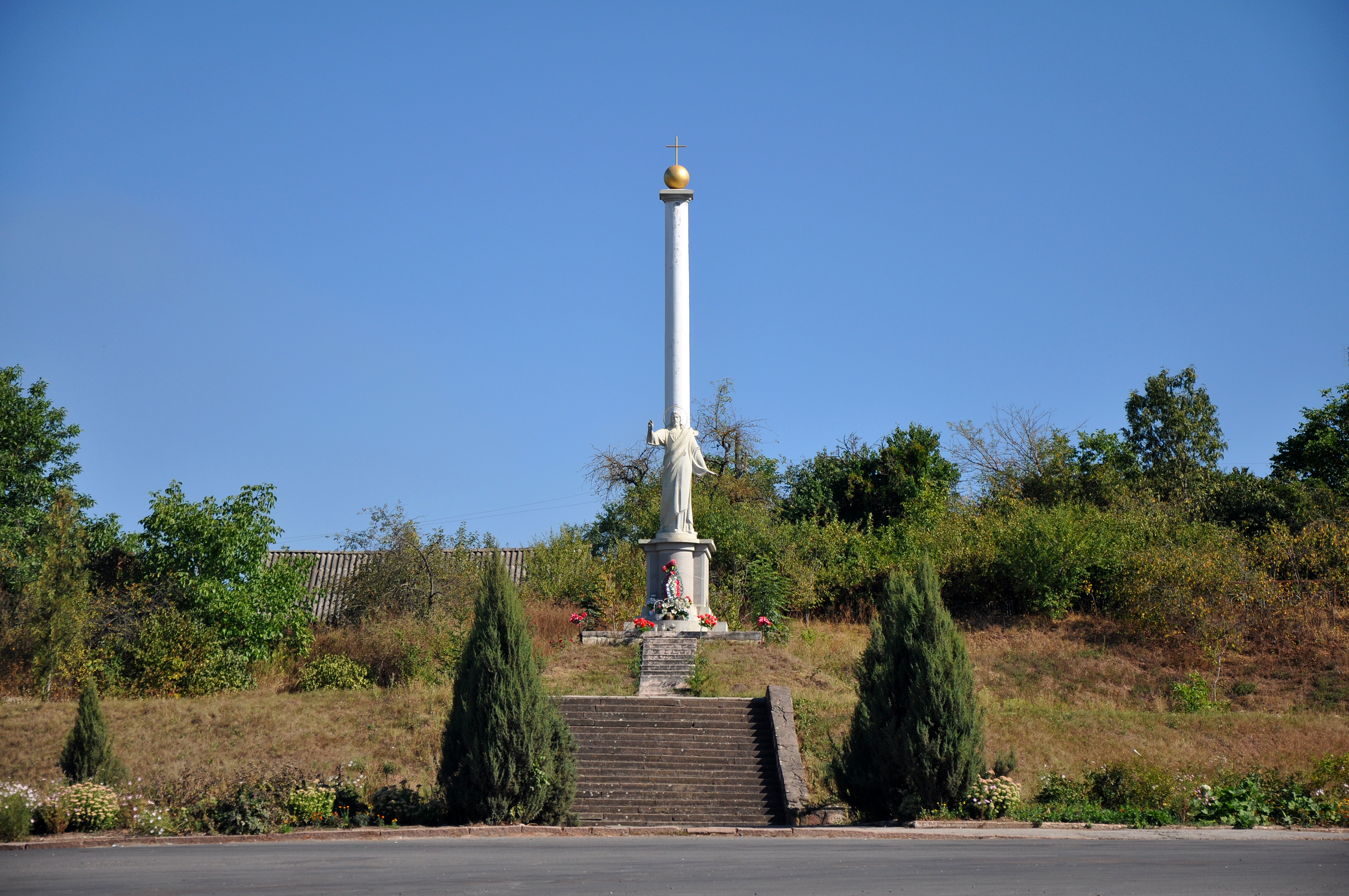 Монумент Христові-Спасителю (Бучач) в Бучачі Тернопільської області на роздоріжжі вулиць генерала Шухевича і Грушевського, т. зв. Чортківському роздоріжжі. Автор — Роман Вільгушинський.